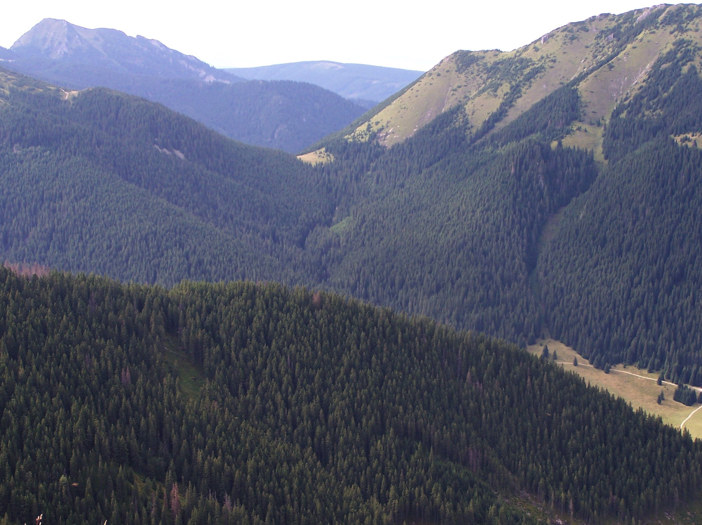 Bobrowiecka Przełęcz i spadający z niej Bobrowiecki Żleb. W głębi Osobita (West Tatra Mountains)